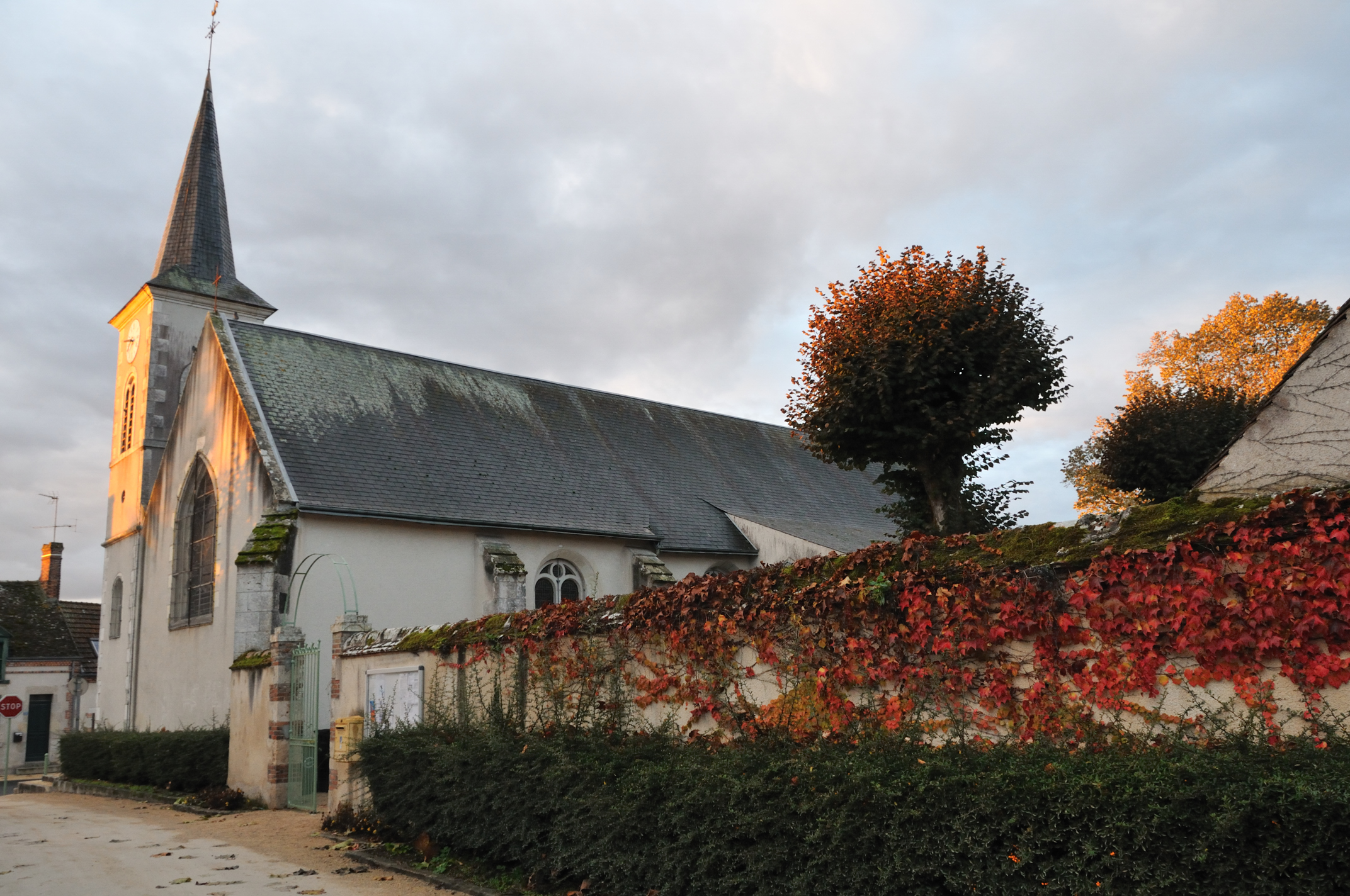 Église Saint-Pierre, Ardon, Loiret, France